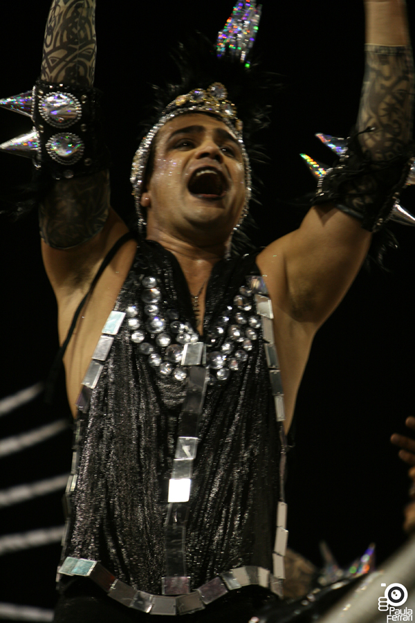 Christian Pior no Carnaval de 2010 em São Paulo.